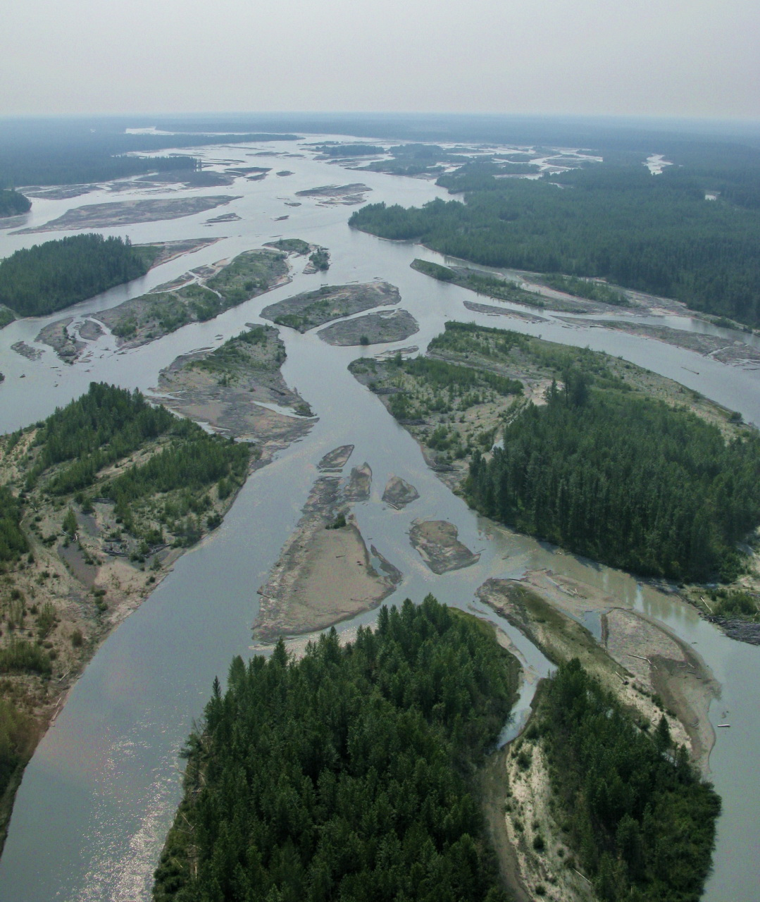 Chulitna, Susitna, and Talkeetna rivers